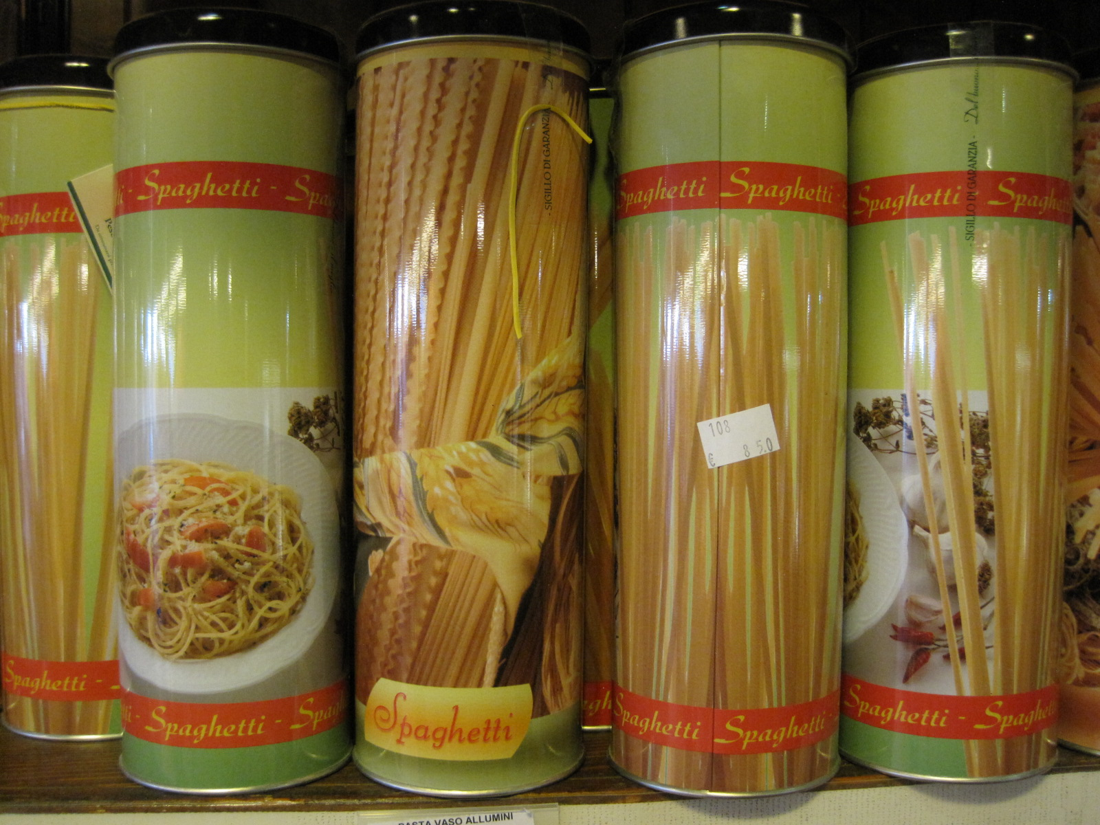 Spaghetti